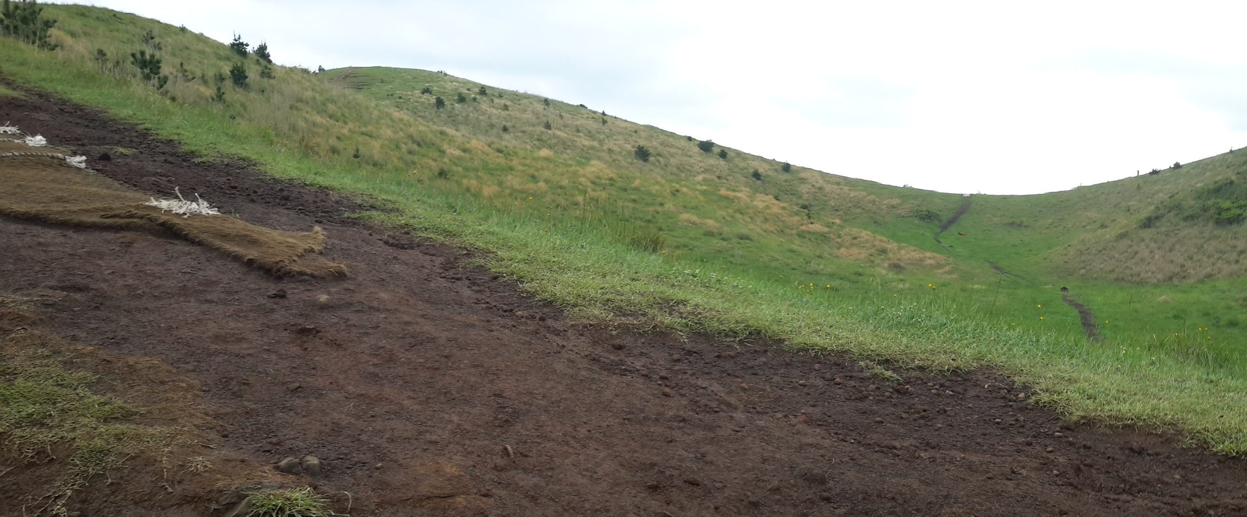 용눈이오름에서의 사진 (2018.05.08)